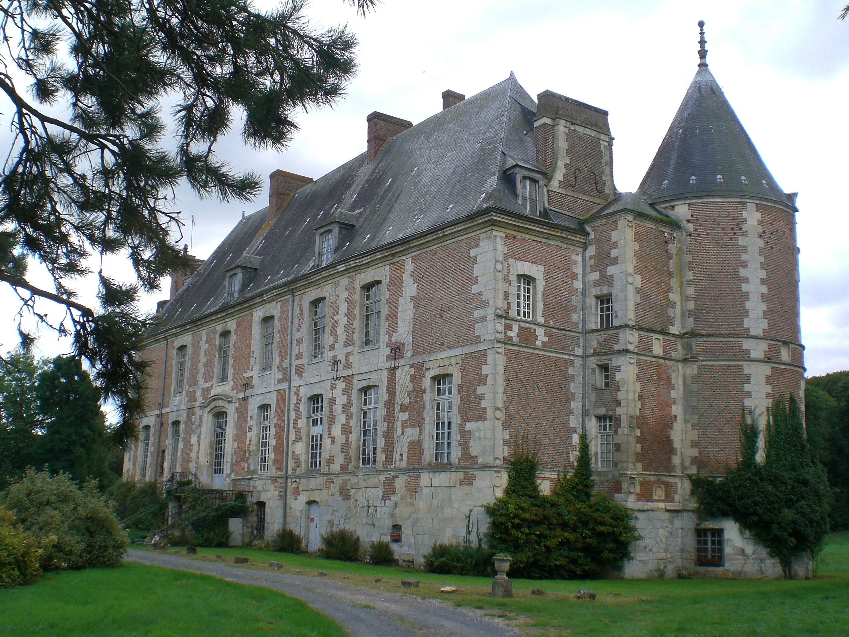 chateau de Fosseuse construit entre 1568 et 1583, Oise, France